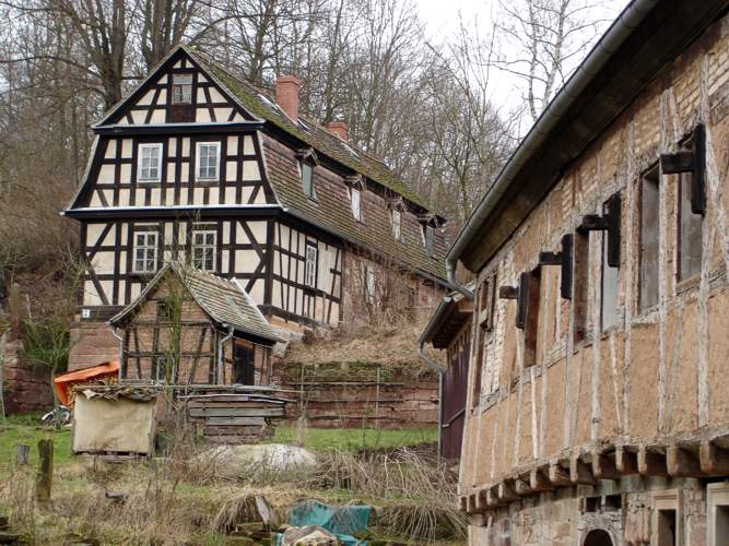 Papiermühle in Nausnitz bei Jena (Thüringen)